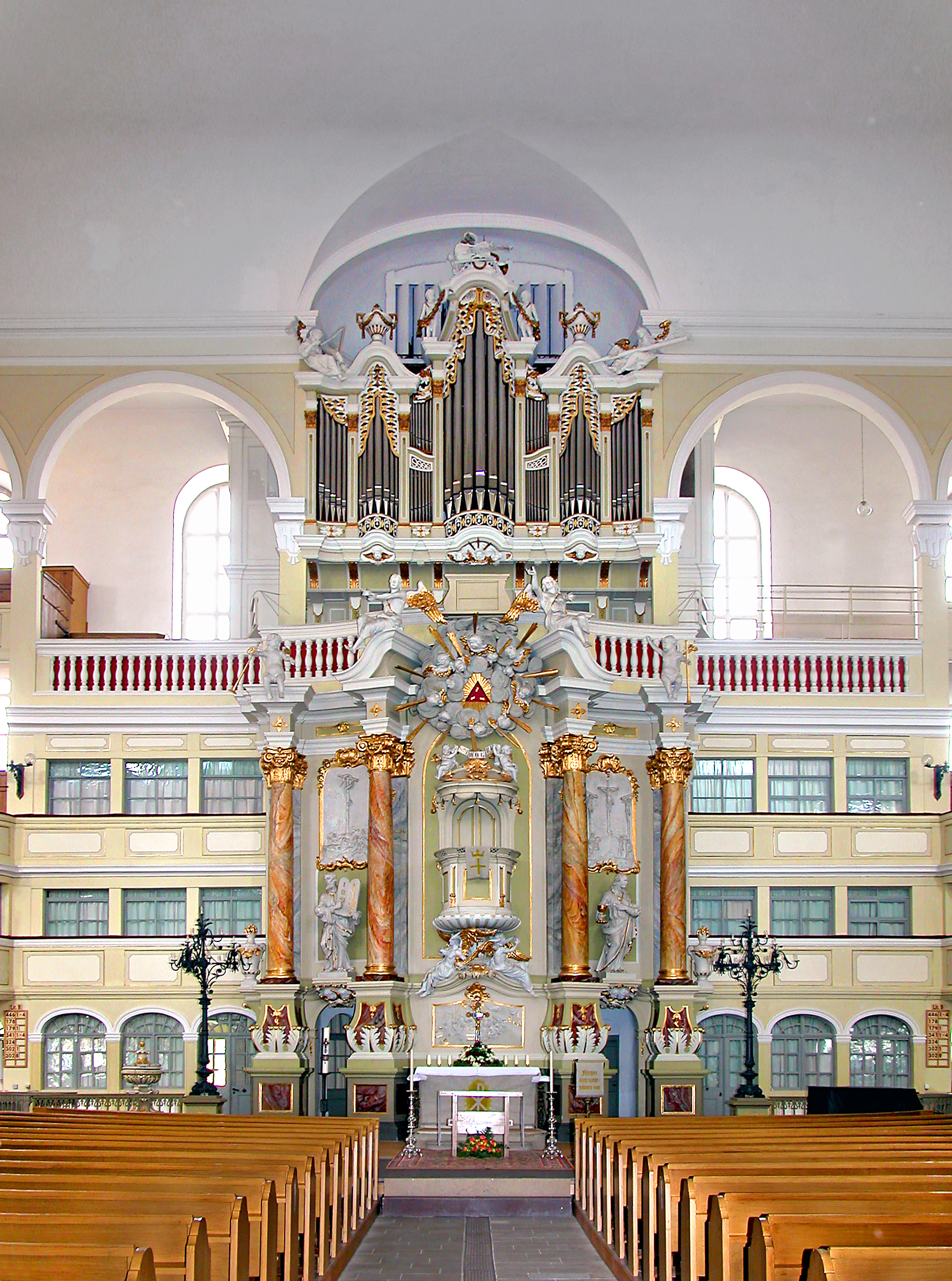 08.05.2007 01558 Großenhain, Kirchplatz (GMP: 51.292566,13.530377): Spätbarocke Marienkirche, 1744-1748 von J. G. Schmidt mit Benutzung älterer Teile. Kanzelaltar von Friedrich Wilhelm Mieth, 1755/56 aus Sandsteon, Holz und Gips. Orgel 1901 von der Firma Gebrüder Jehmlich, Dresden. [DSCN27897.TIF]20070508155DR.JPG(c)Blobelt